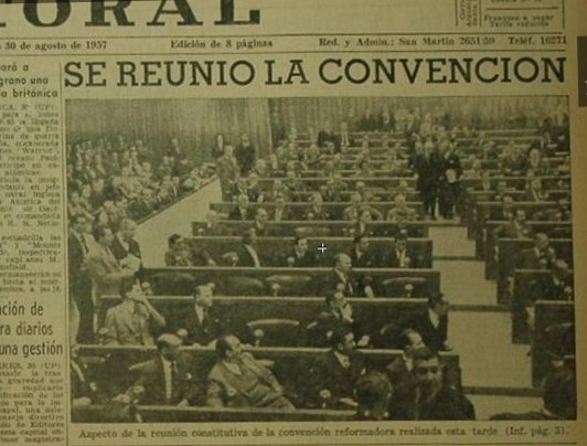 Convención Constituyente de 1957. Títular del diario El Litoral de Santa Fe del 30 de agosto de 1957